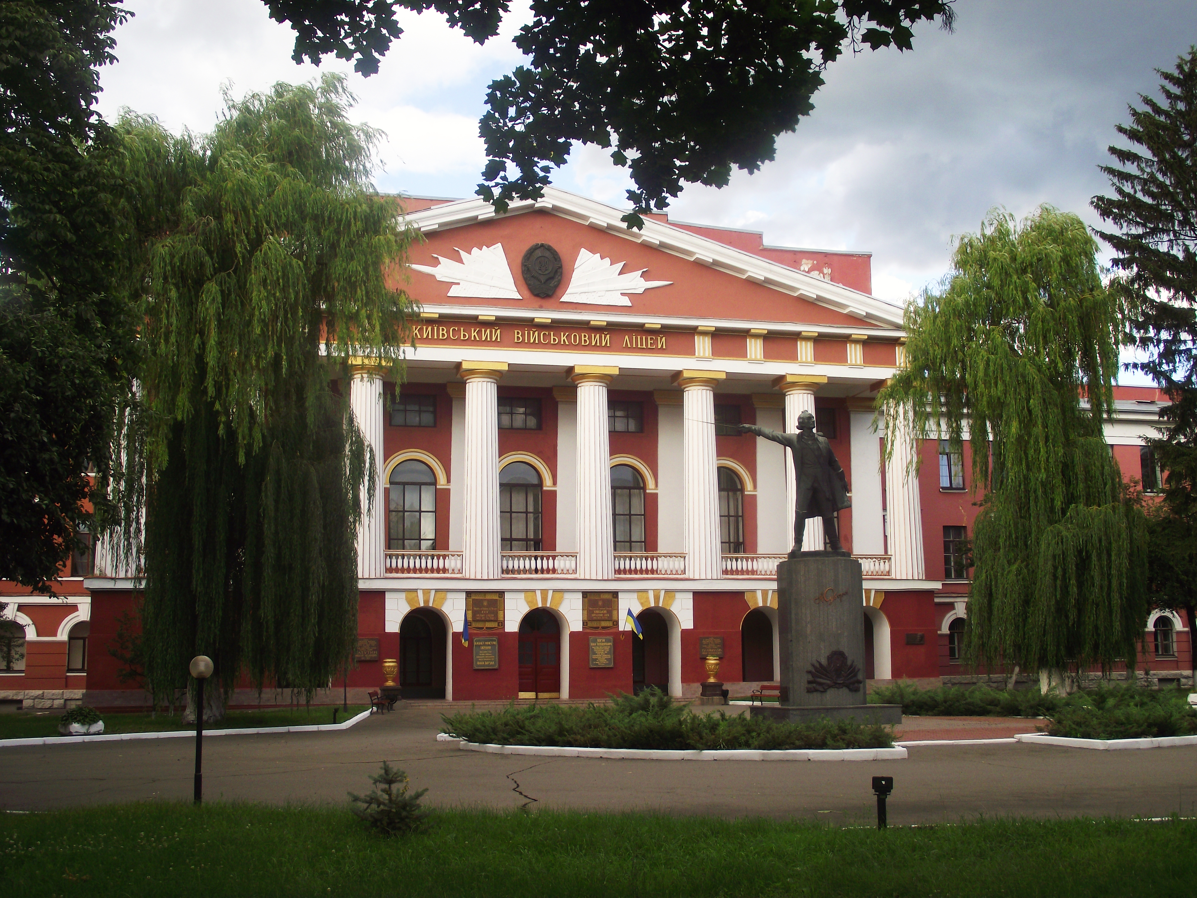 1914–1916 Корпус військової школи